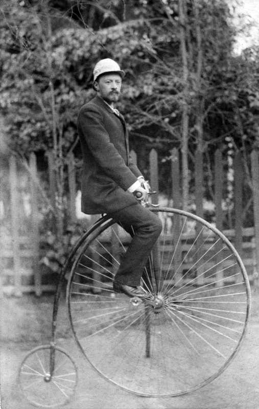 В. Г. Шухов на велосипеде Паук